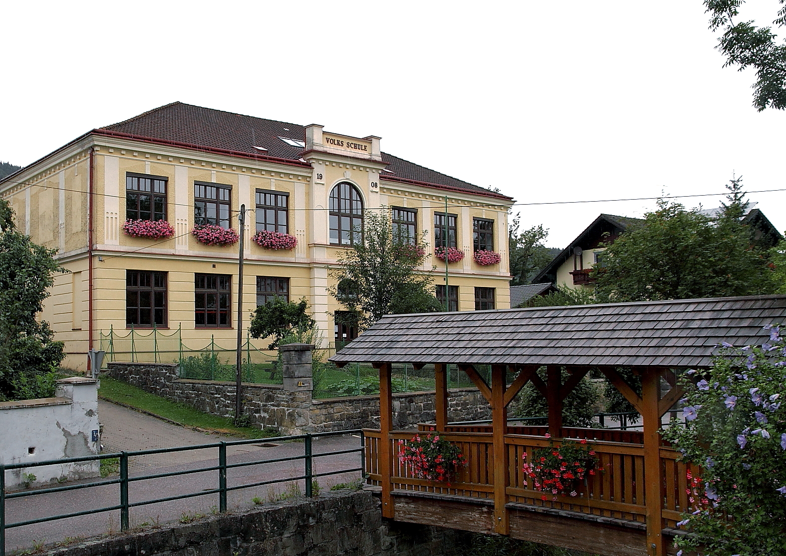 Schule der niederösterreichischen Gemeinde Eschenau. 1908 anlässlich dem 60-jährigen Regierungs-Jubiläums des Kaisers Franz Joseph I. als Jubiläumsvolksschule errichtet.